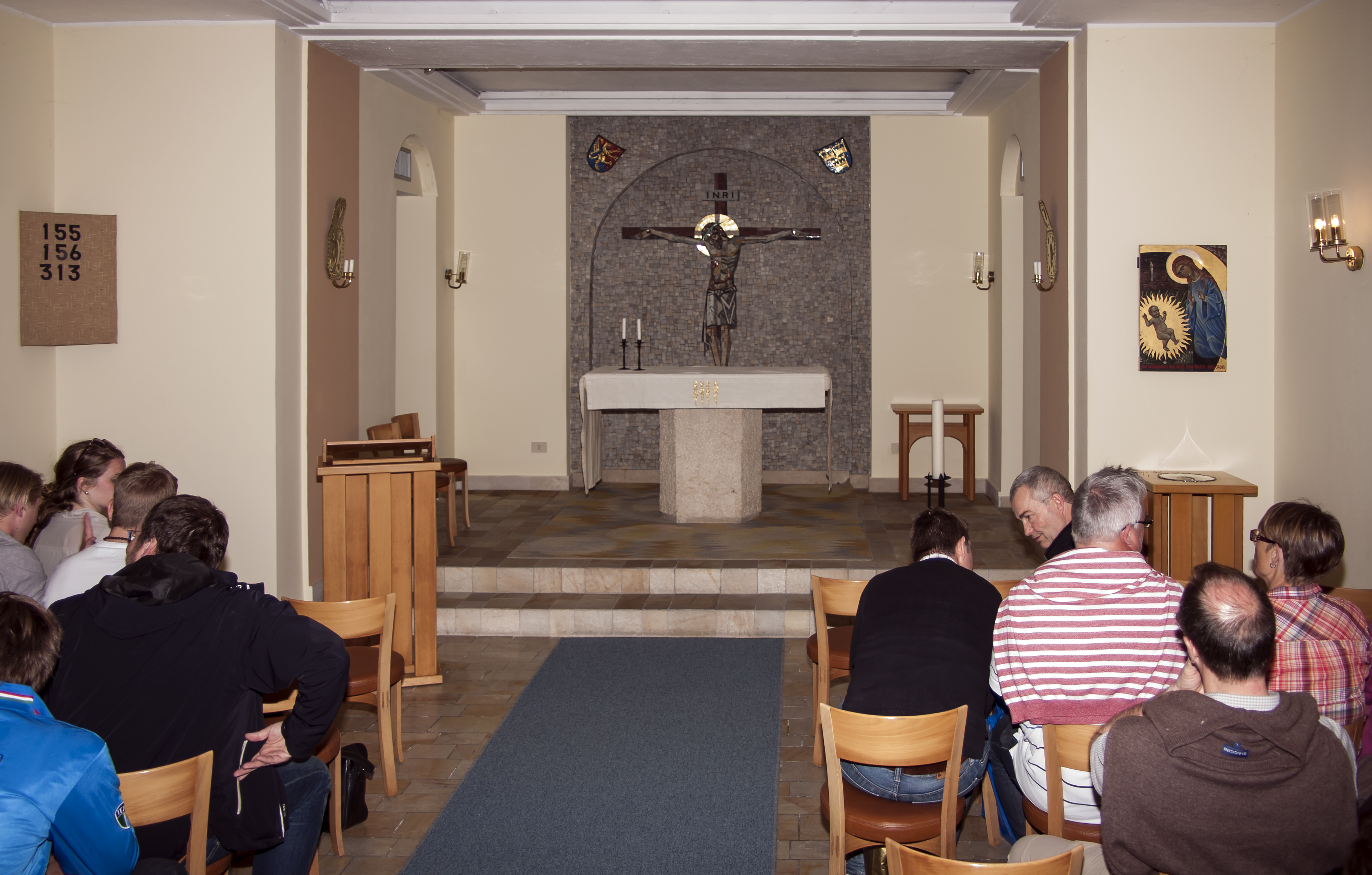 Skuts (Svenska kyrkan i utlandet) kapell i Birgittahuset i Rom.